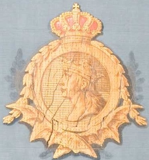 Vapnet för Stockholms Borgerskaps militärkårer. Ett krönt Sankt Eriks huvud.